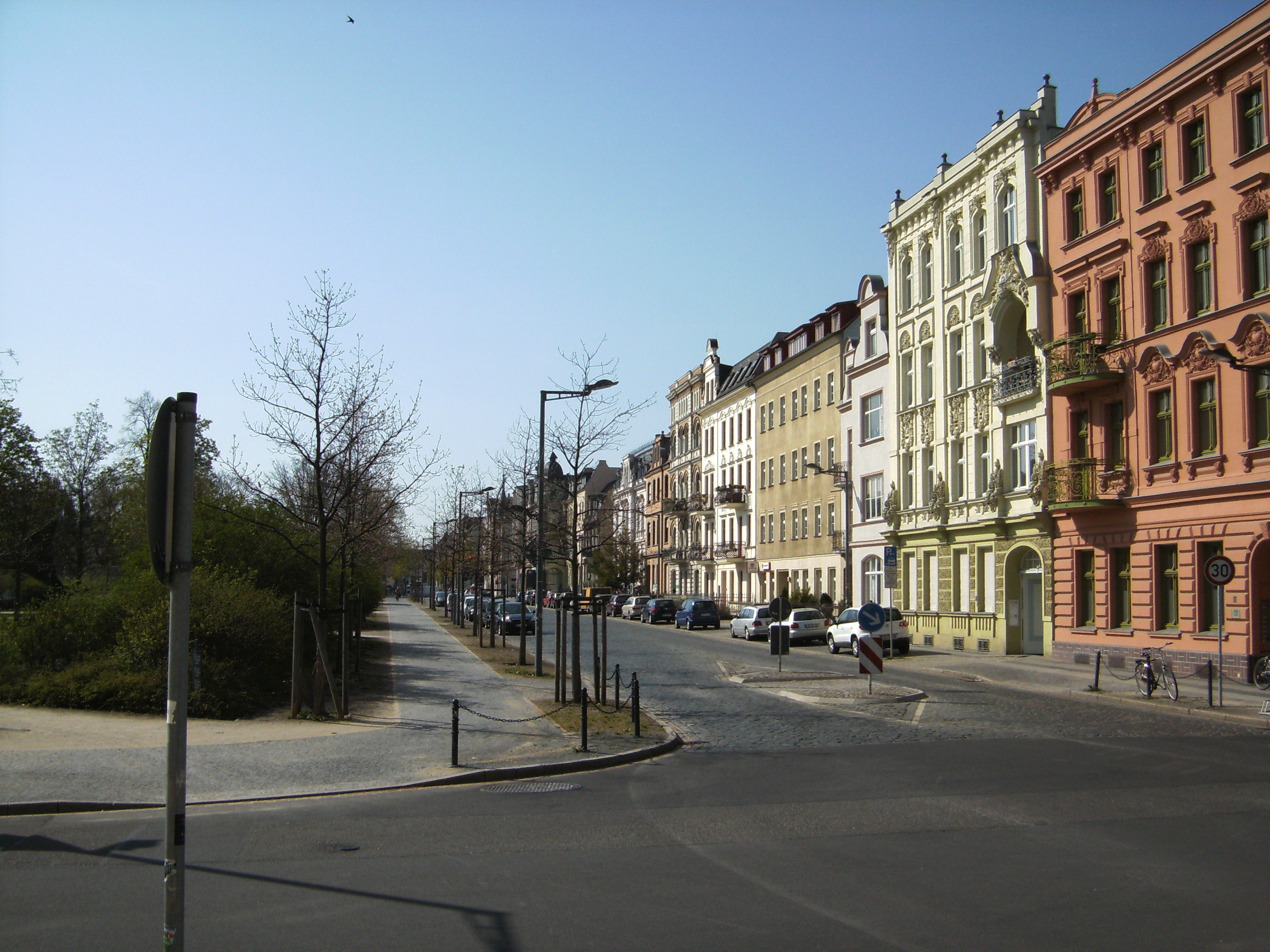 Schillerstraße Blick Richtung Süden